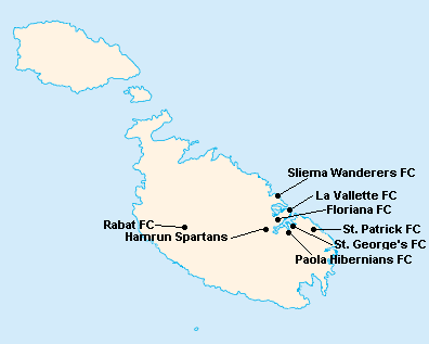 Répartition des clubs en First Division Maltaise 1951-1952.